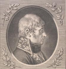 Jean-Charles Monnier (1758-1816), général de division en 1800. Dessiné par Barbier l'aîné, gravé par Charles Étienne Gaucher (1741-1804) en l'an X.